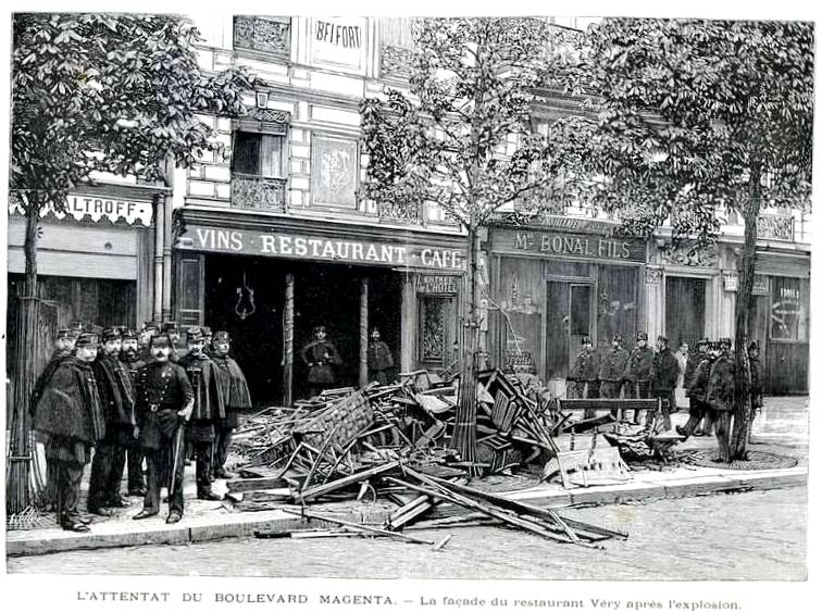 Dégâts après l'explosion du restaurant Very au 24 boulevard de Magenta, le 25 avril 1892